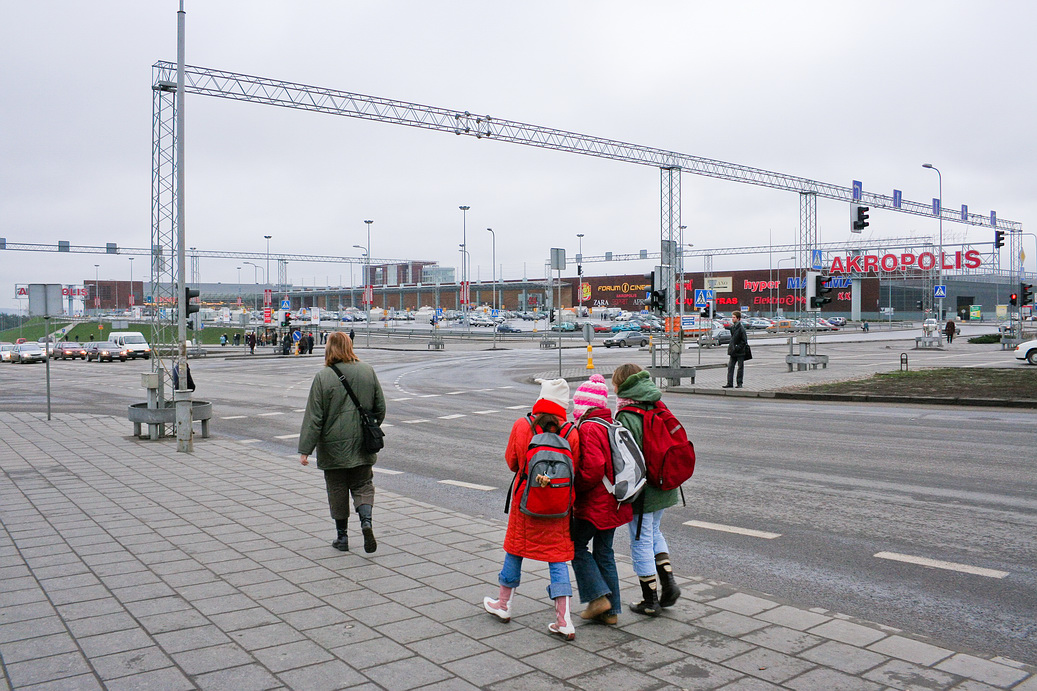 Akropolis Supermarket in Vilnius